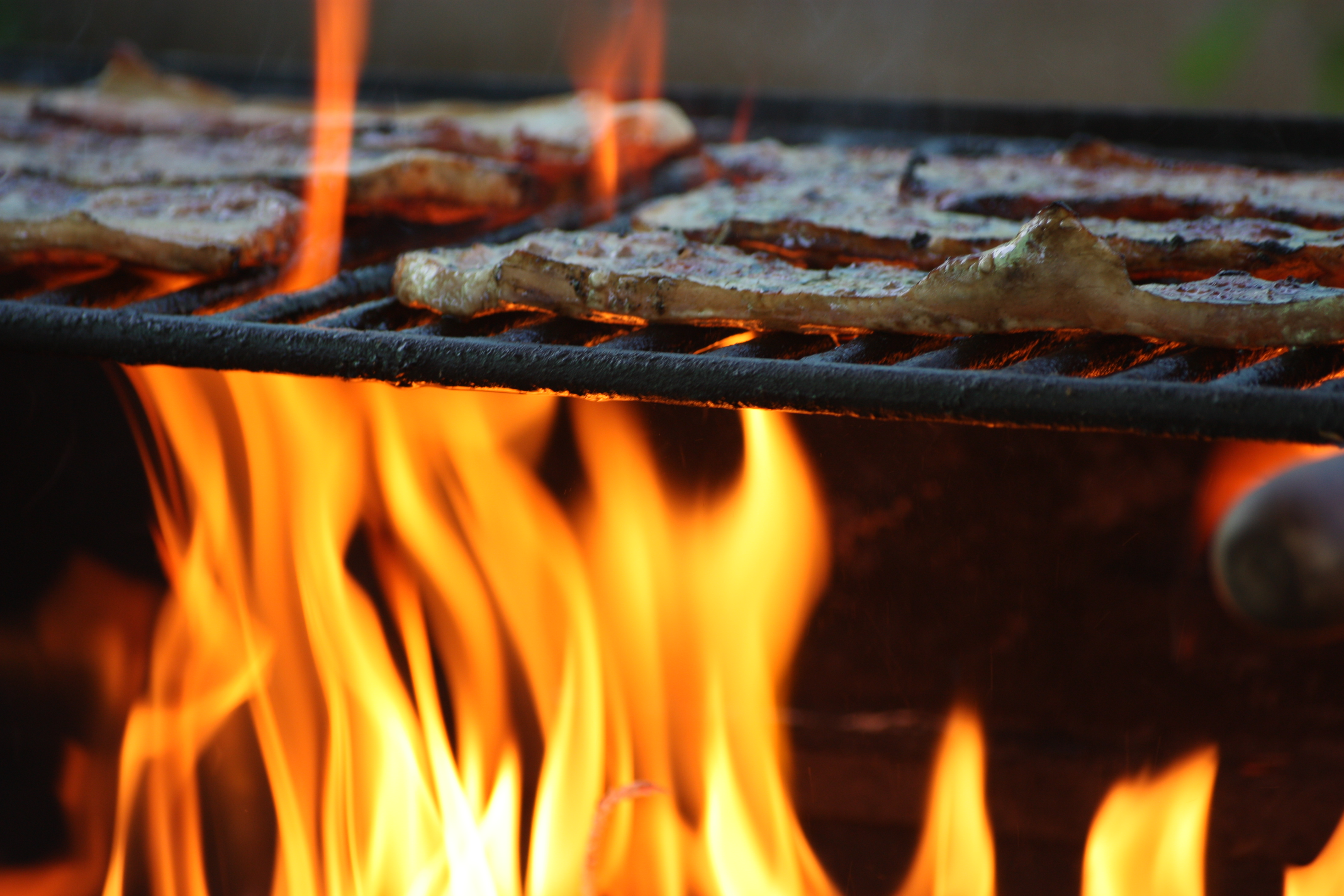 El fuego haciendo su trabajo con filetes de rica carne.